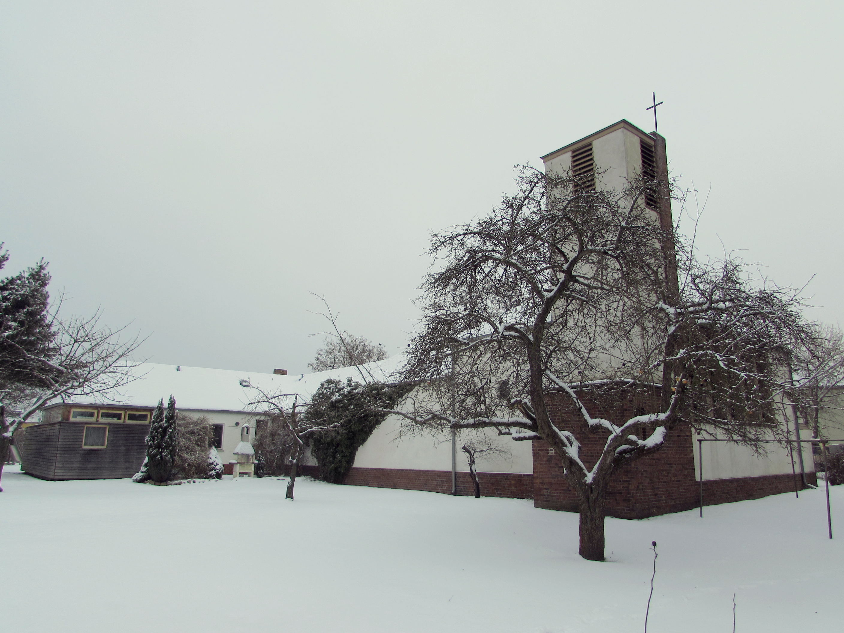 christuskirche brandenburg ansicht nordwest